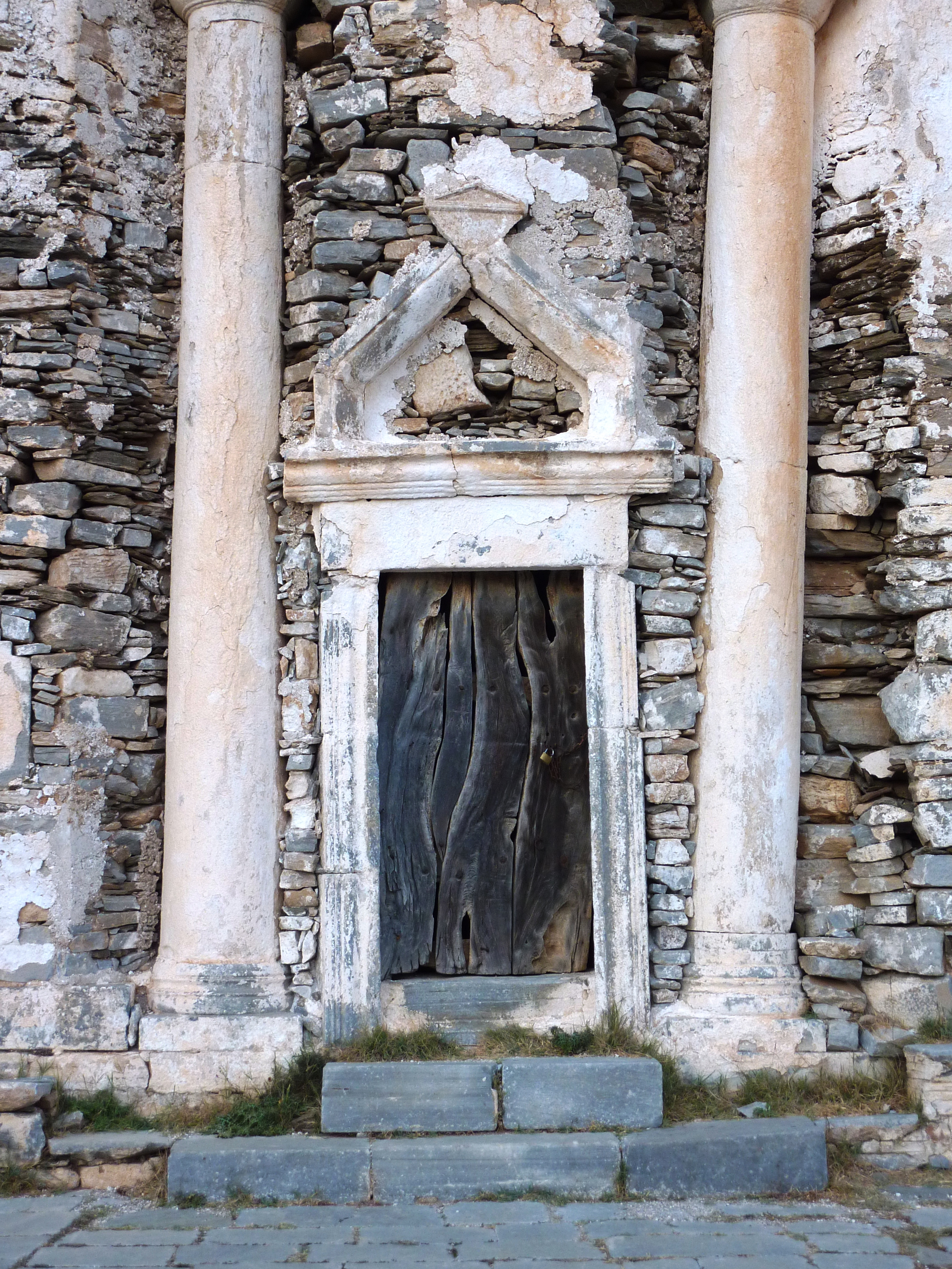 Ναός Επισκοπής Σικίνου«Ναός Επισκοπής Σικίνου»